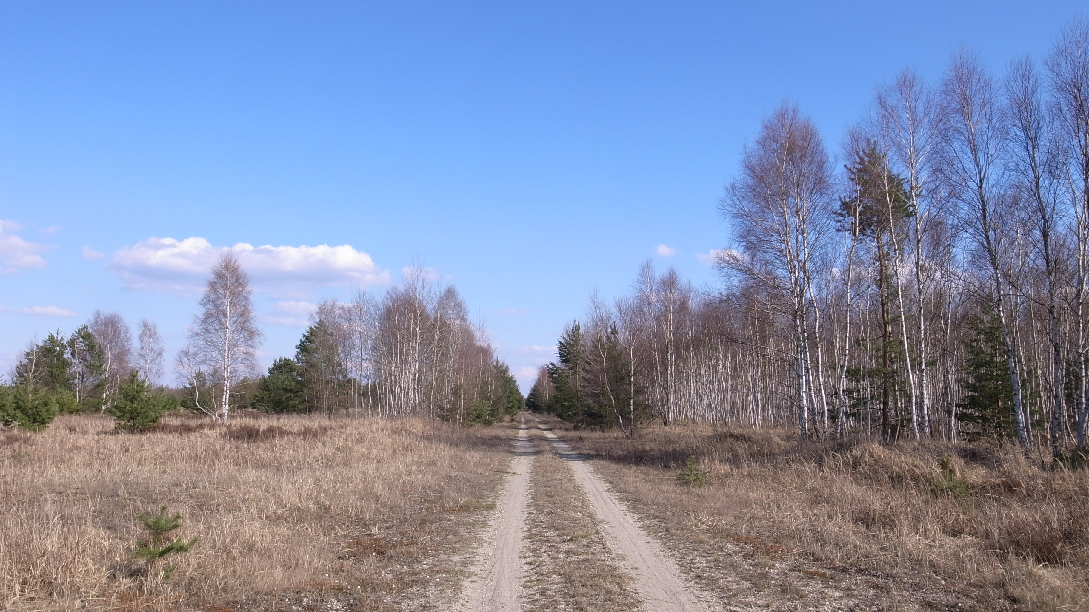 Oranienbaumer Heide. FFH Gebiet Nr. 4240-301, Mittlere Oranienbaumer Heide.[1]